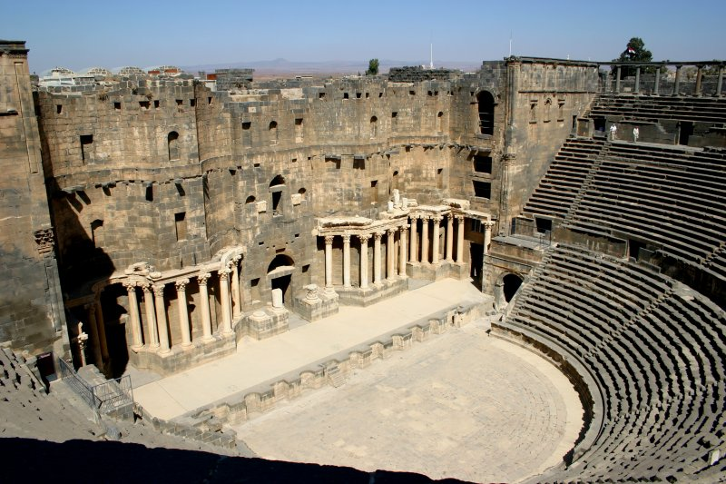 Zitadelle von Bosra, eigenes Bild von 2006 public domain Mewes